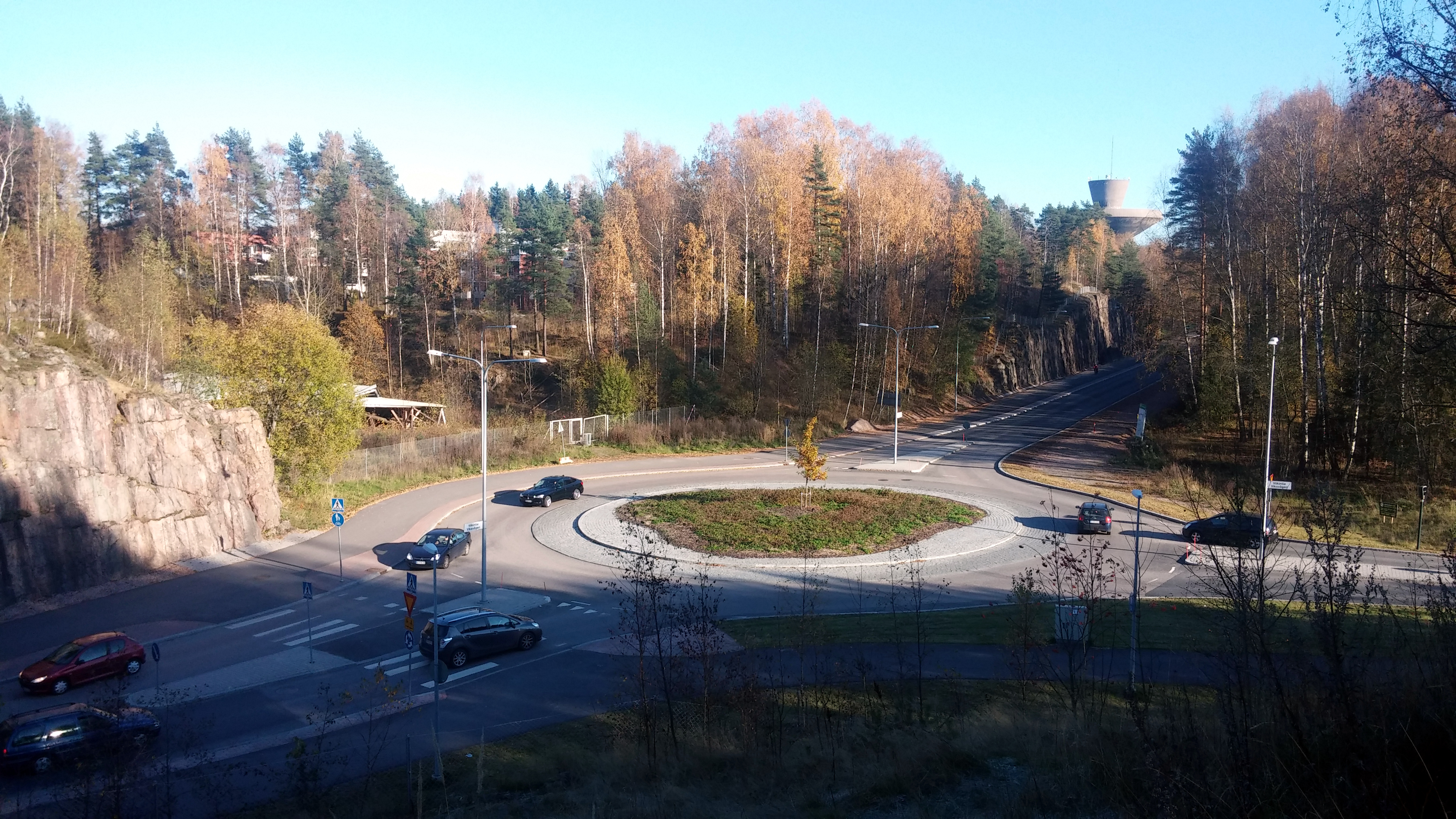 Viikintien ja Viilarintien kiertoliittymä.